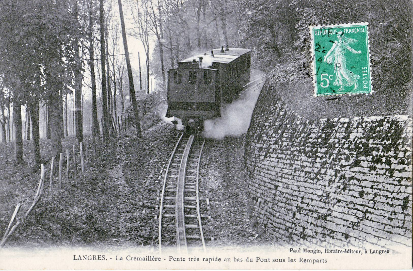 Carte postale ancienne éditée par Mongin Langres : La crémaillère - Pente très rapide au bas du pont sous les remparts On voit parfaitement la crémaillère, système Riggenbach